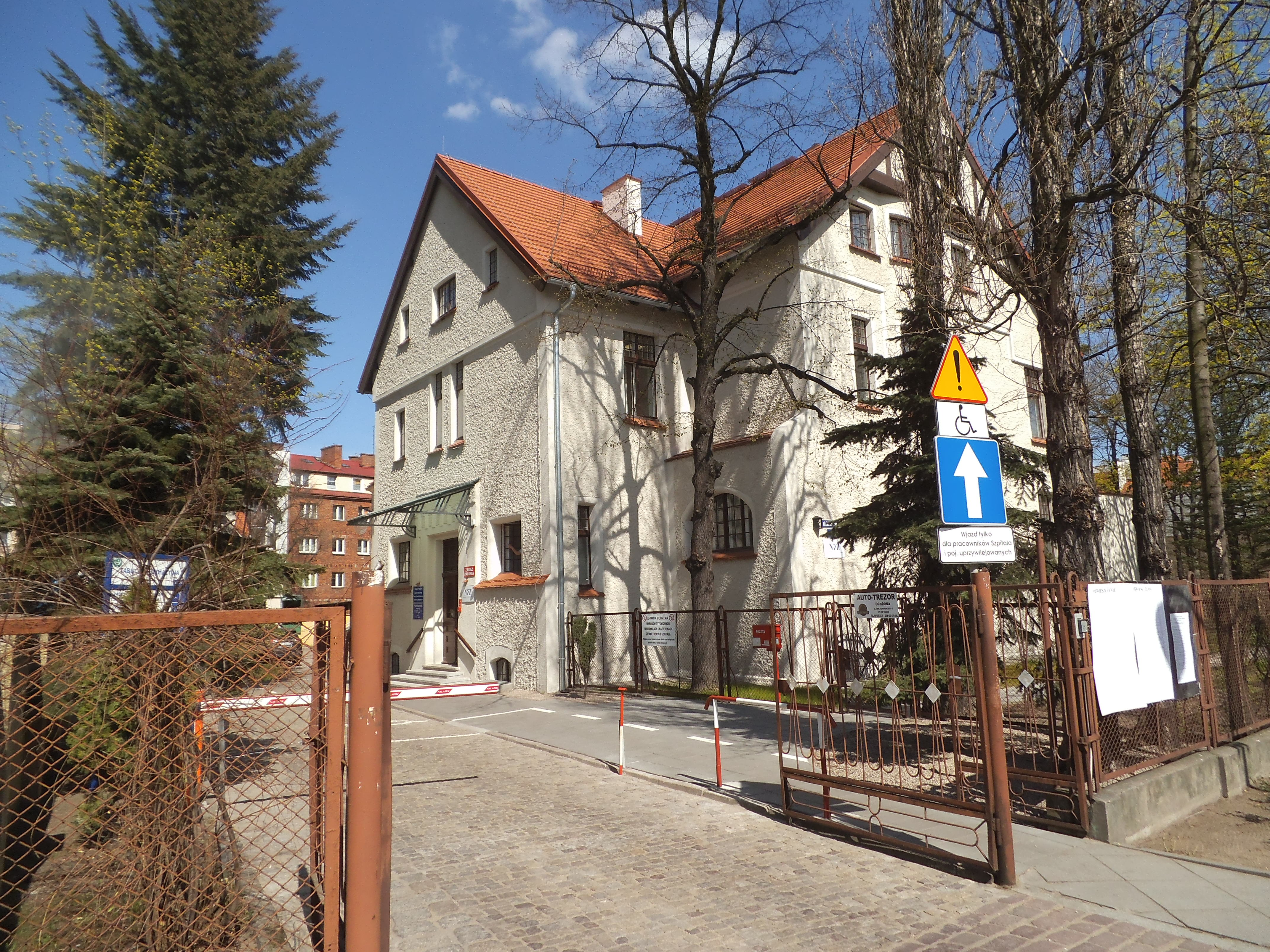 Szpital, Toruń